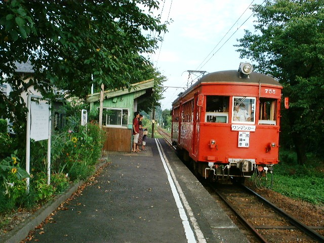 名古屋鉄道揖斐線・清水駅のホームとモ750形